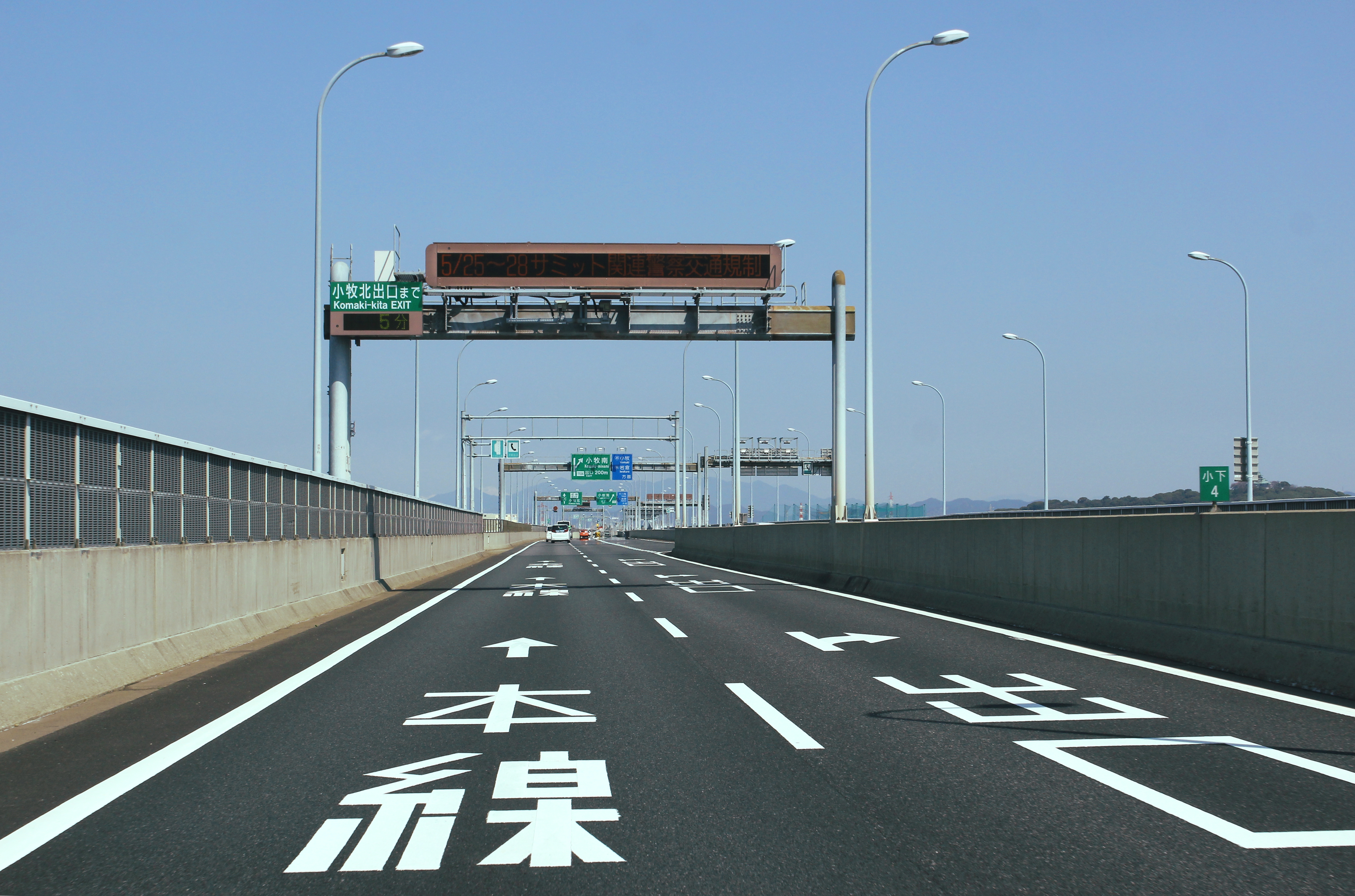 名古屋高速11号小牧線 情報表示器